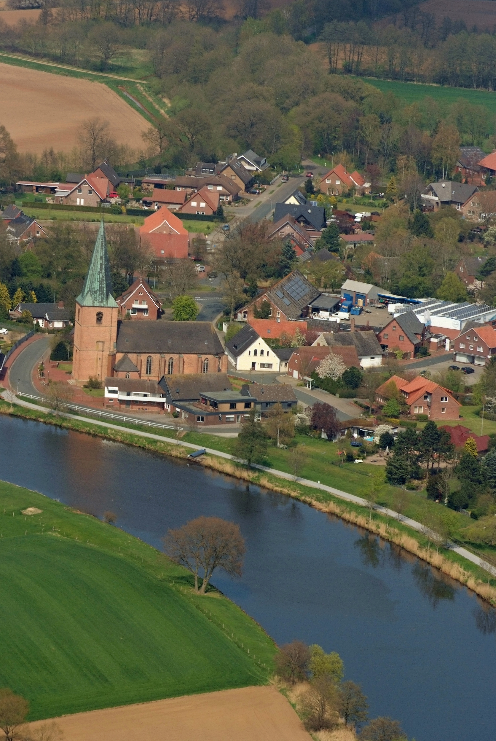 Fotoflug von Nordholz-Spieka nach Oldenburg und Papenburg